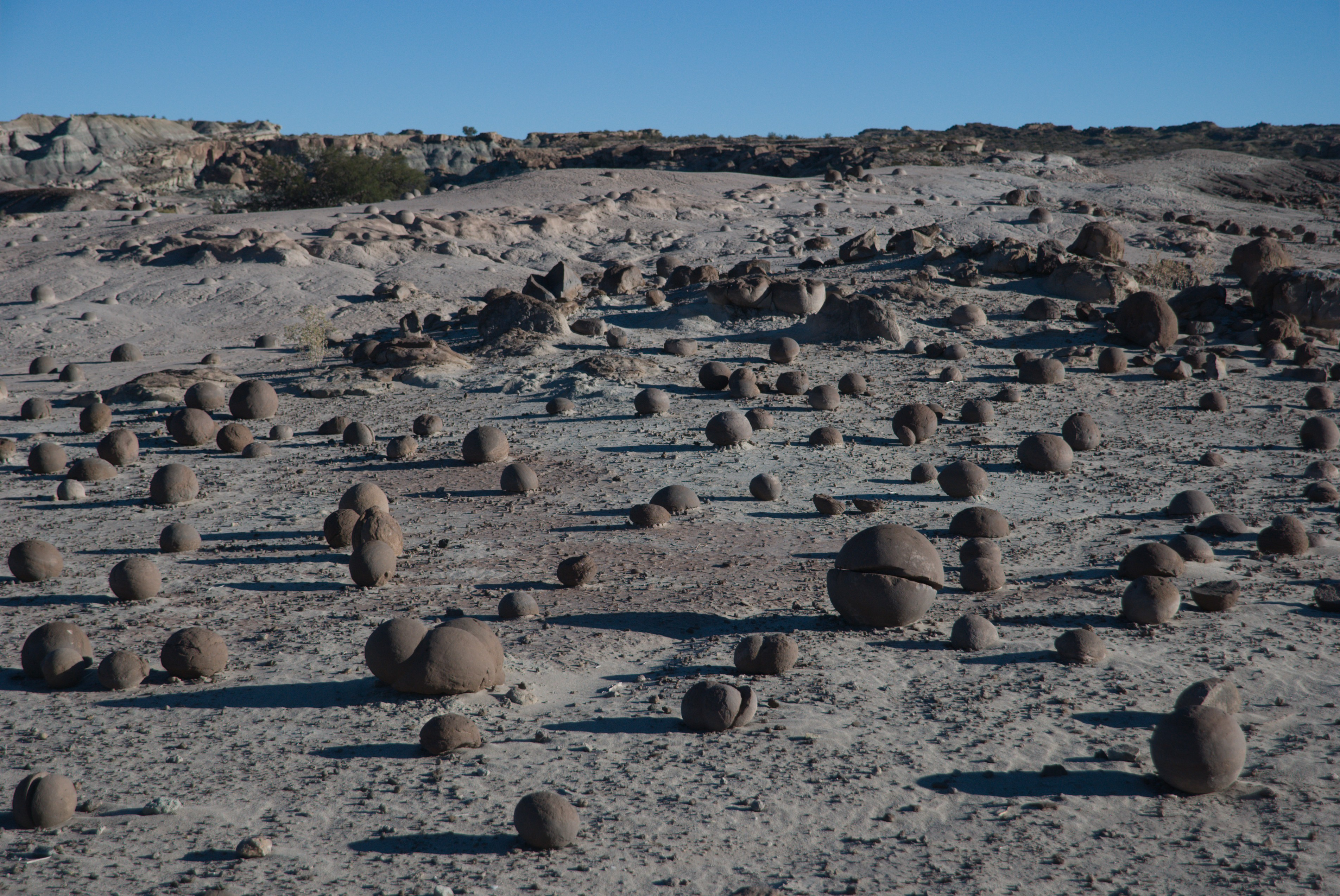 Yacimiento de Ischigualasto